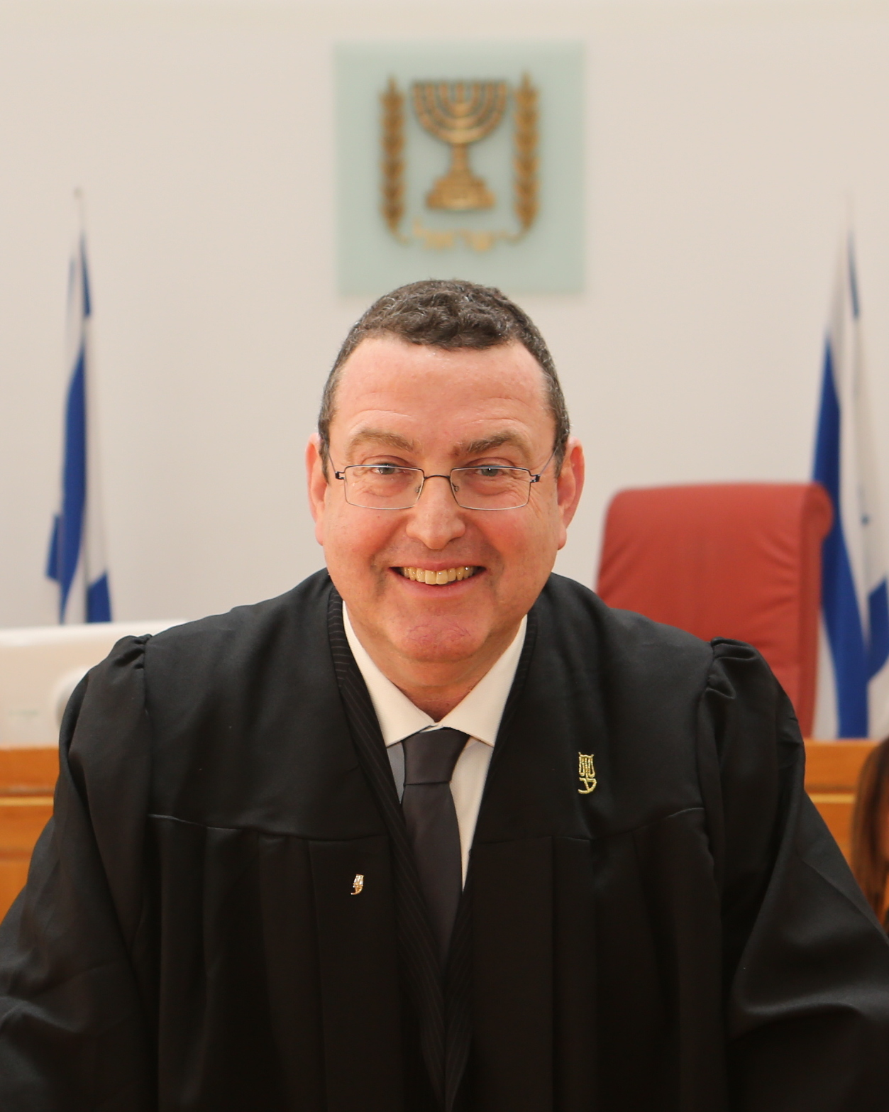 איתן ארז עורך דין ישראלי